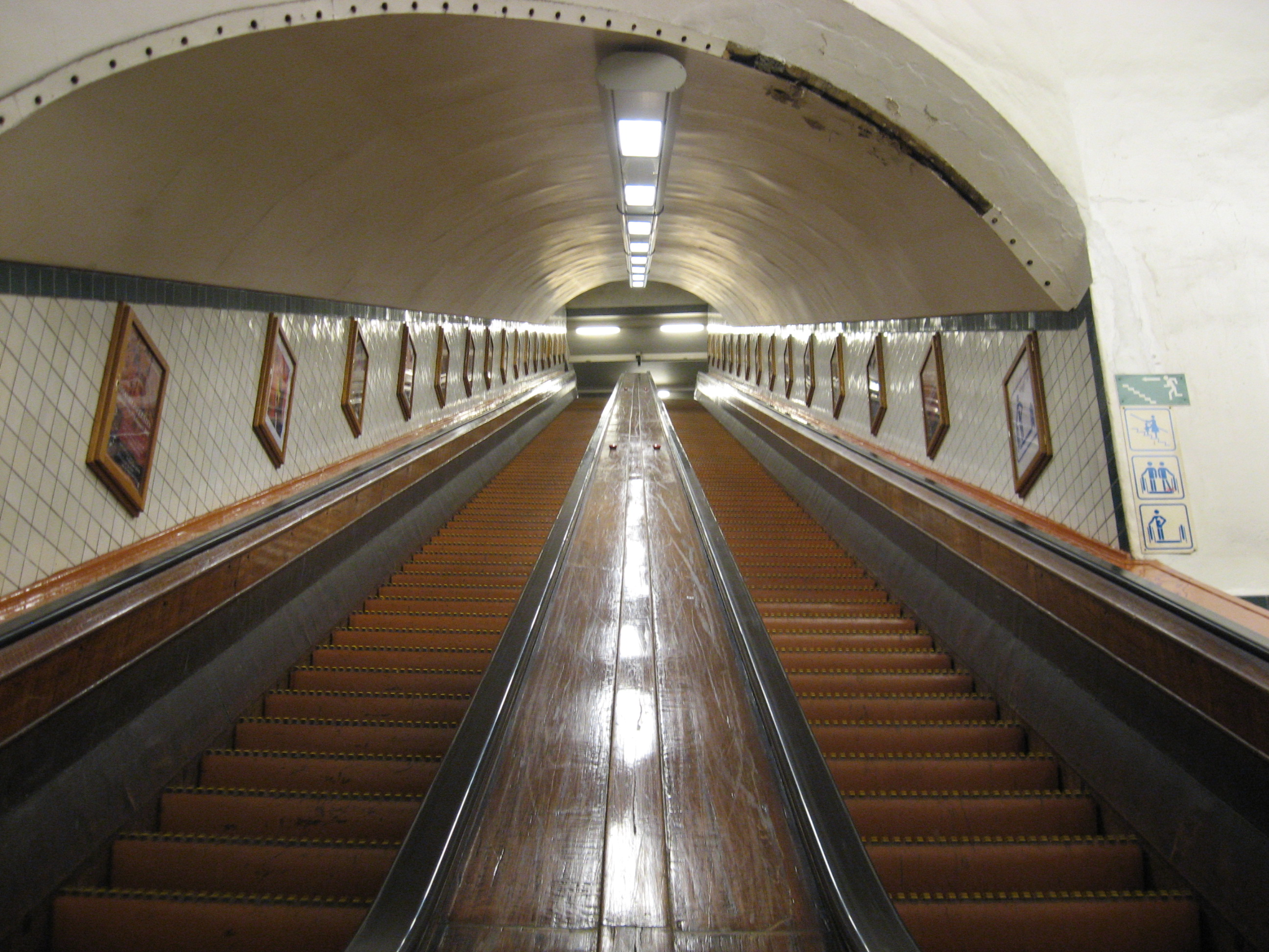 De roltrappen naar de sint-annatunnel